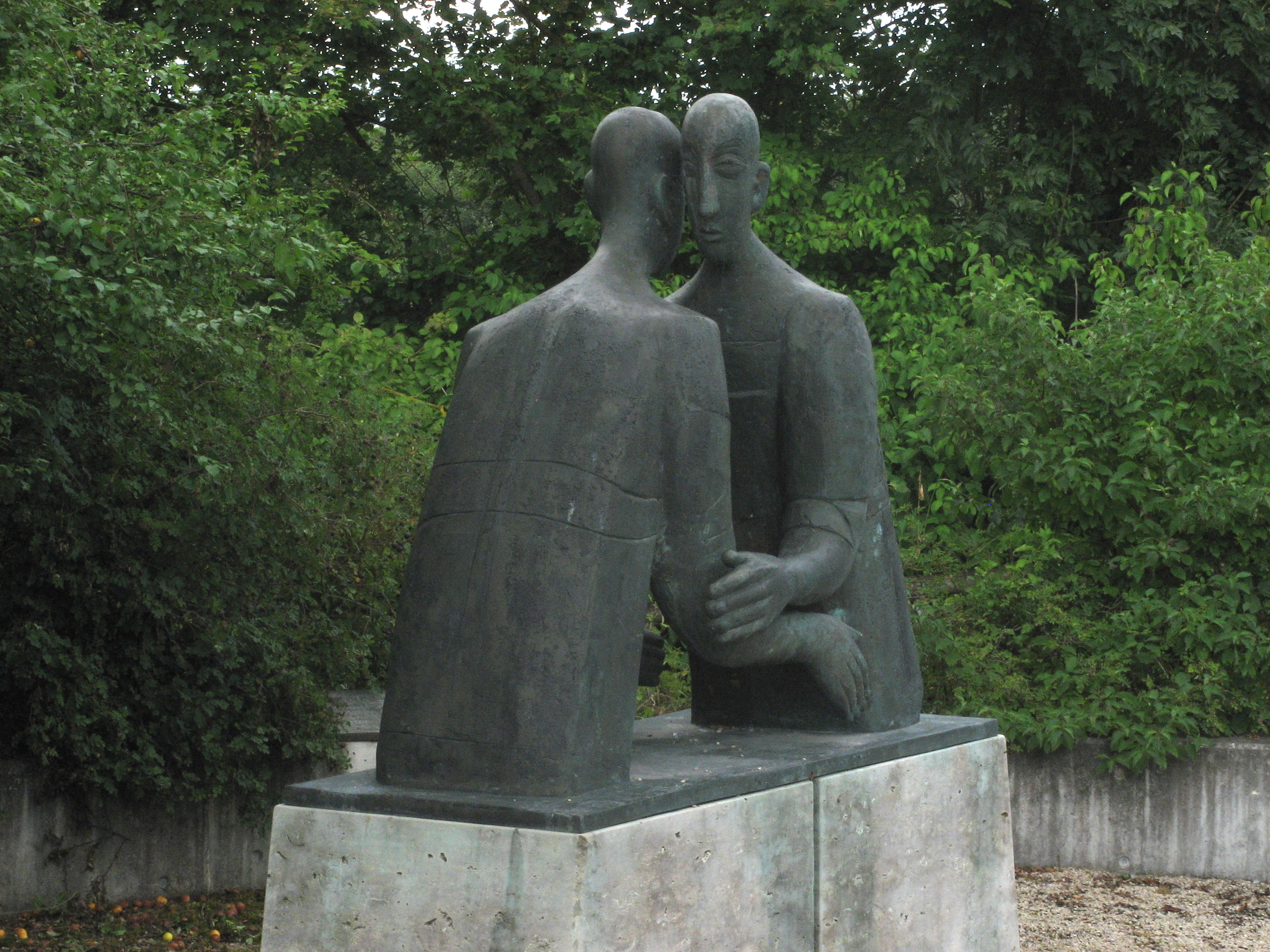 Bavière